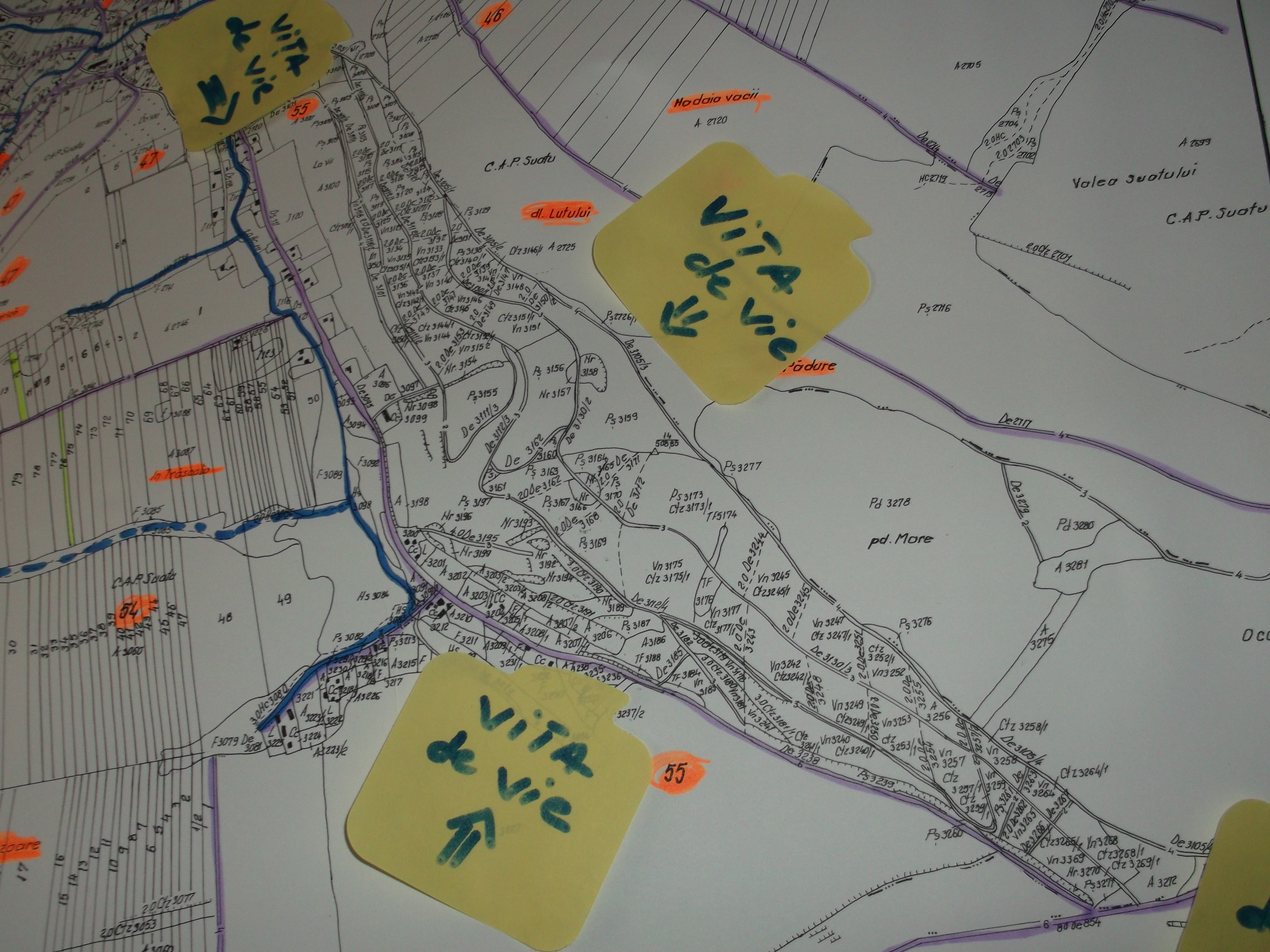 Amplasamentul culturii vitei de vie